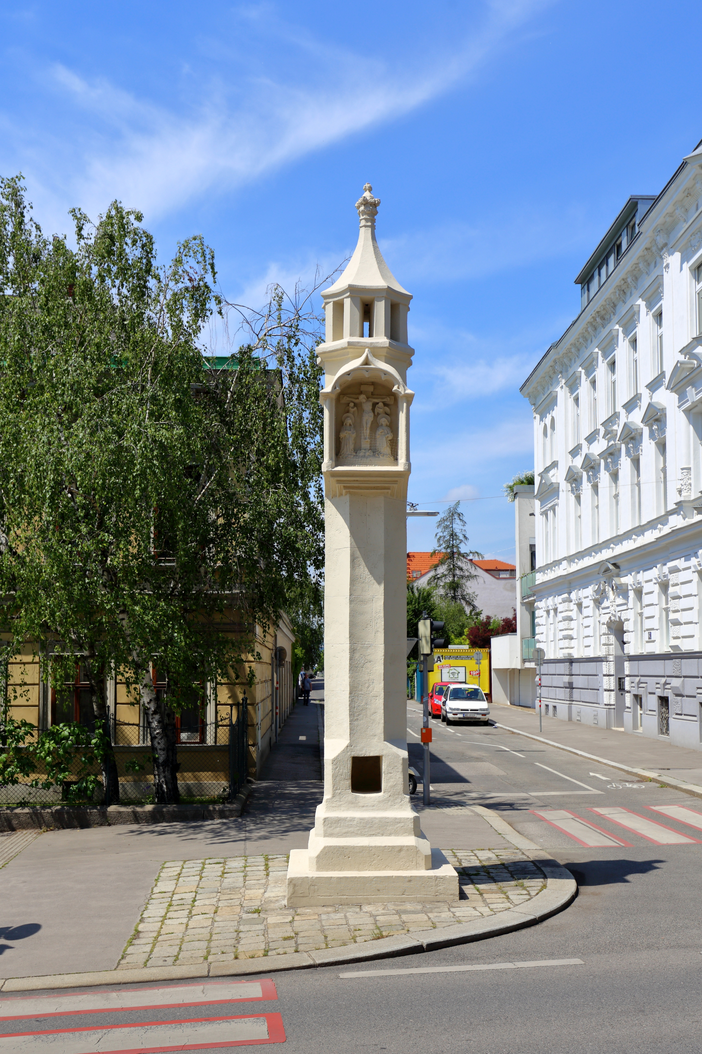 Lichtsäule vor der Penzinger Pfarrkirche St. Jakob im 14. Wiener Gemeindebezirk Penzing.Die Penzinger Lichtsäule ist ein spätgotischer Tabernakelpfeiler aus dem 15. Jahrhundert oder Anfang des 16. Jahrhunderts. Sie besteht aus einem zweistufigen Sockel und einer oktogonalen Säule. Obenauf ein Lichthäuschen mit acht Pfeilern und unter diesem ein verzierter Erker mit einem Steinrelief, das die Kreuzigung Jesu Christi darstellt. In Sockelnähe und erkerseitig befindet sich eine Kaminöffnung. Ursprünglich stand sie als Totenleuchte beziehungsweise Friedhofsleuchte inmitten des die Kirche umgebenden Friedhofes. Nach Auflassung des Friedhofes wurde sie gegenüber dem Hauptportal der Kirche auf die andere Straßenseite versetzt.